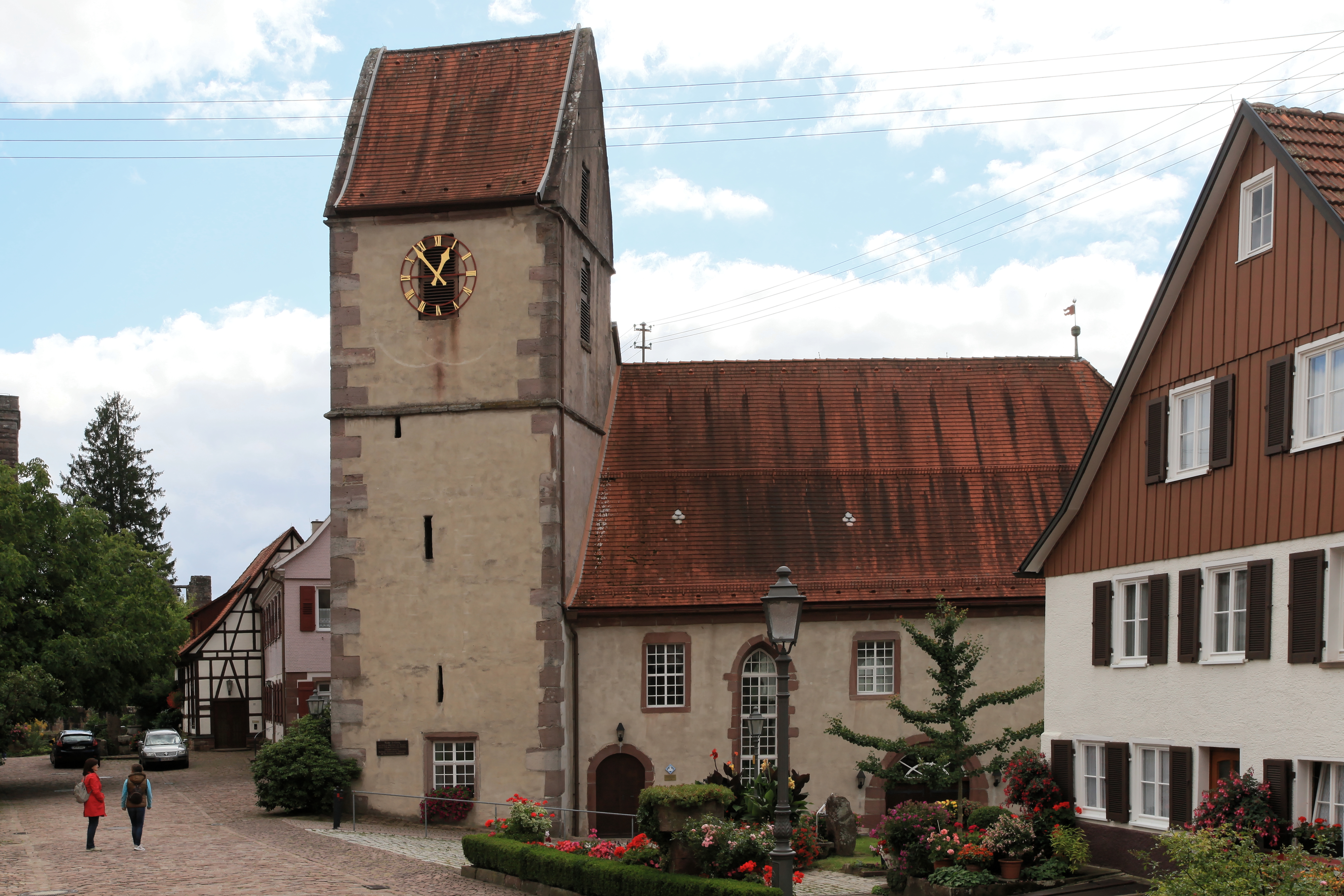 Im Städtle mit Georgskirche in Zavelstein, Bad Teinach-Zavelstein